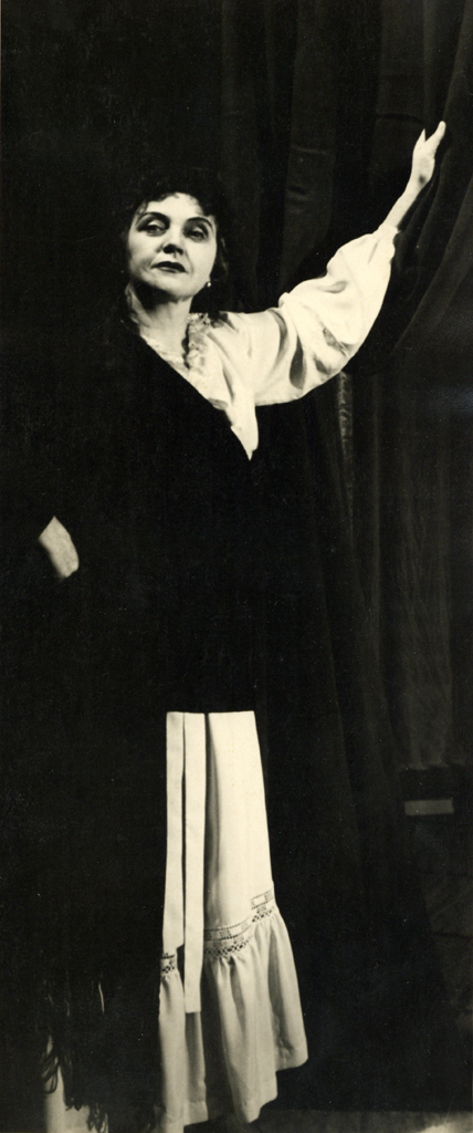 Eduardo De Filippo, Filumena Marturano, Mestno gledališče v Ljubljani. Na fotografiji: Mira Danilova (Filomena Marturano).